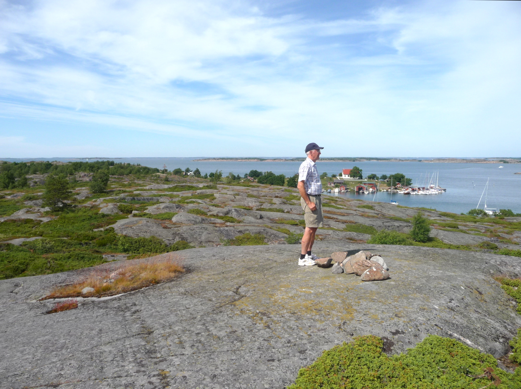 Den svenske botanikern och lavforskaren Roland Moberg, juli 2010. På en häll på Aspö i Åbolands södra skärgård (strax väster om Nötö).